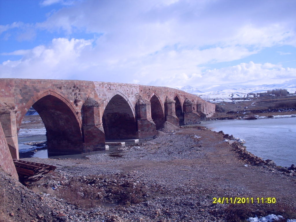 COBANDEDE KOPRUSU - ERZURUM KOPRUKOY